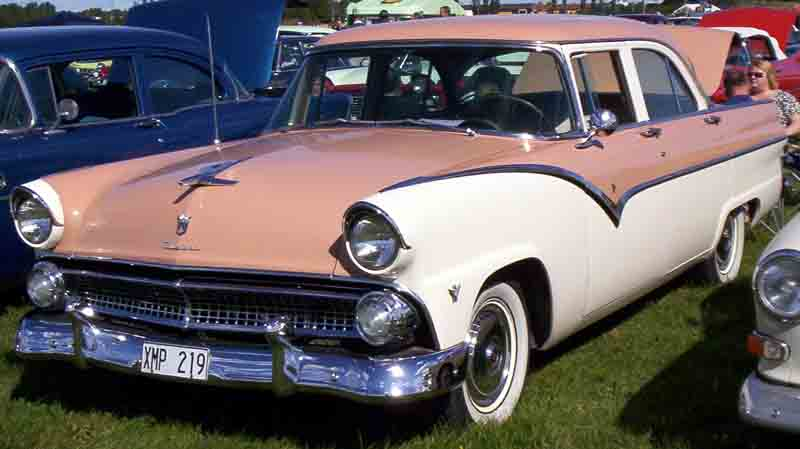 Ford Fairlane 4-Door Sedan 1955